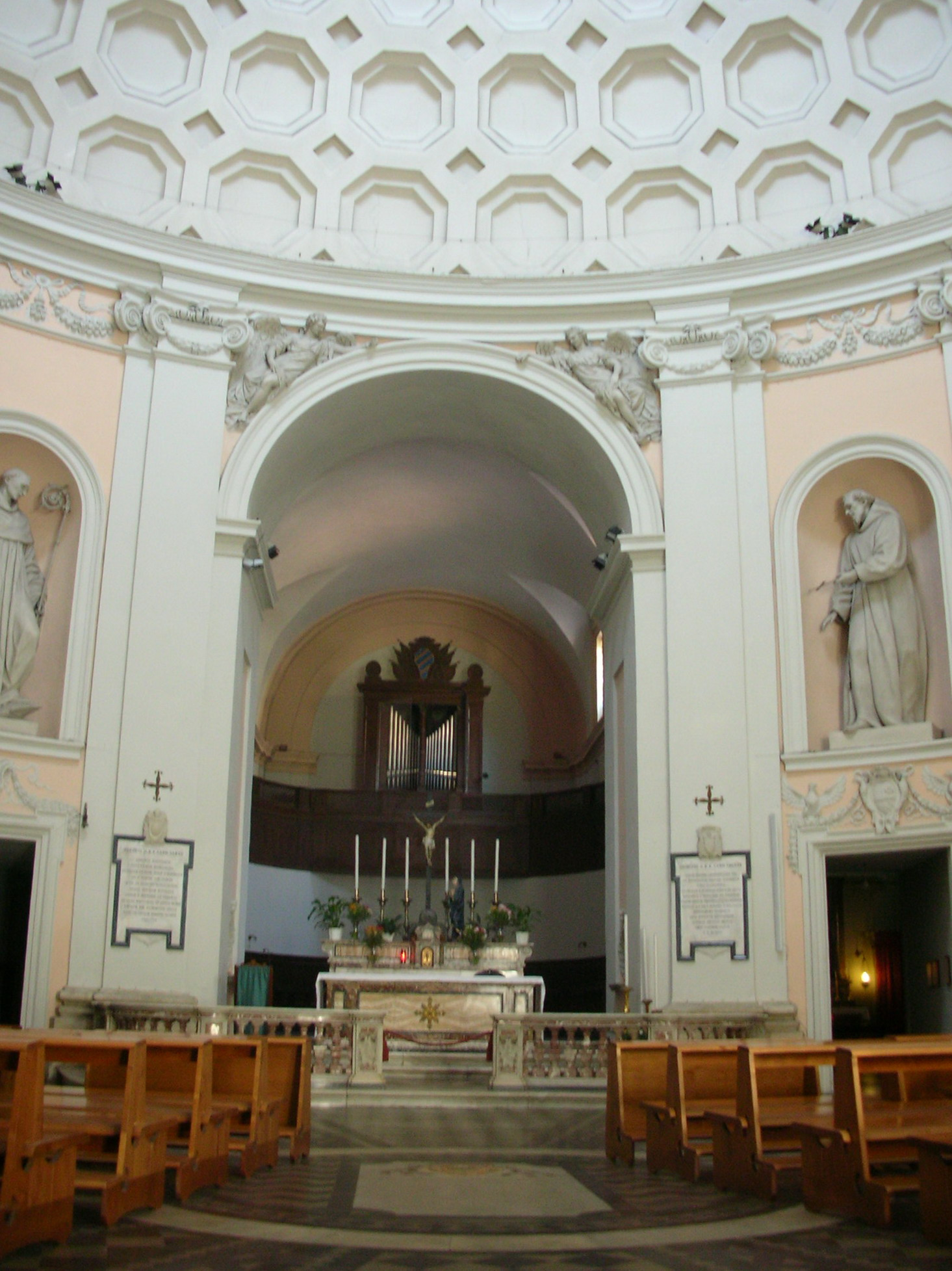 Interior, San Bernardo alle Terme, Rome.